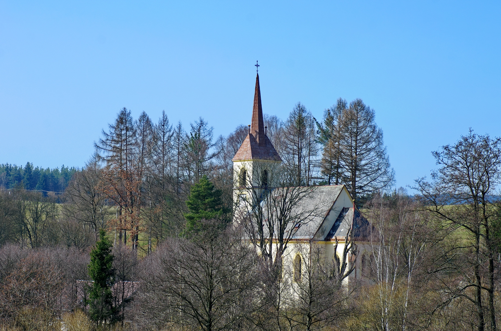 Liboc u Kraslic, kostel Nejsvětější Trojice, okres Sokolov